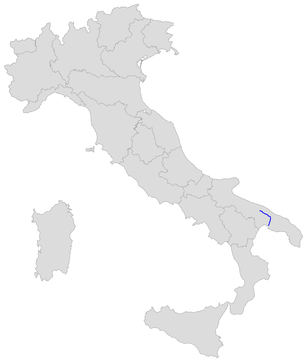 Percorso della SS 172 dei Trulli